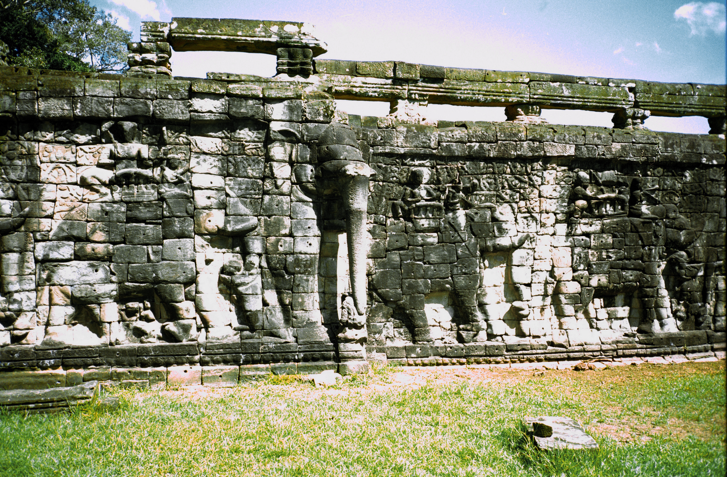 群象台